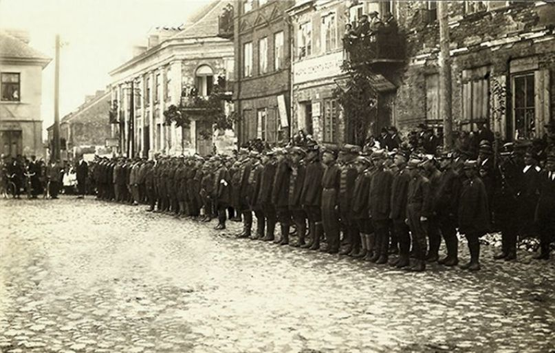 Garnizon Przasnysz, 1934r. Organizacje paramilitarne podczas uroczystości w Rynku